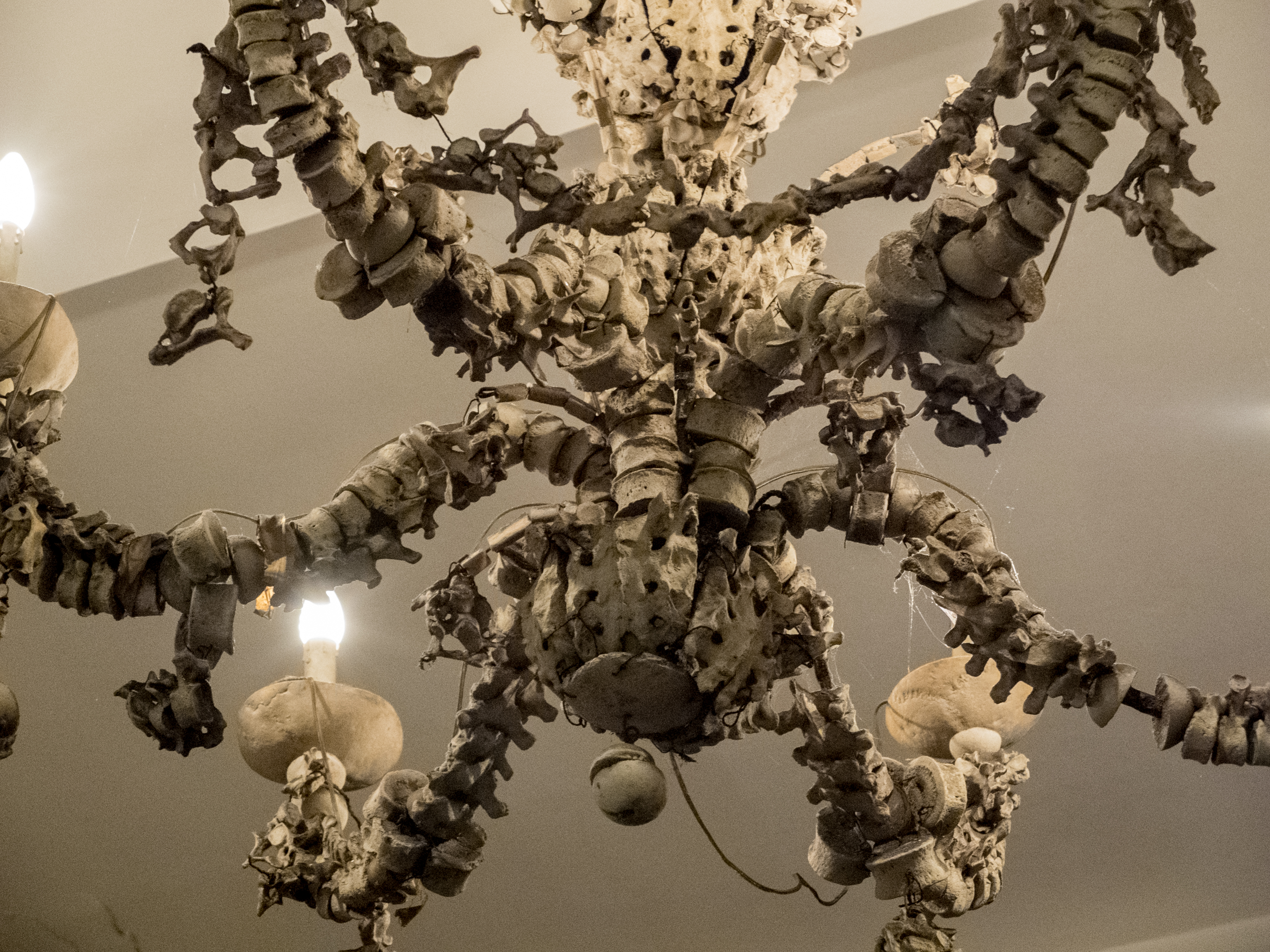 Detalle de una lámpara de araña hecha de huesos humanos en Santa Maria dell'Orazione e Morte (Roma)